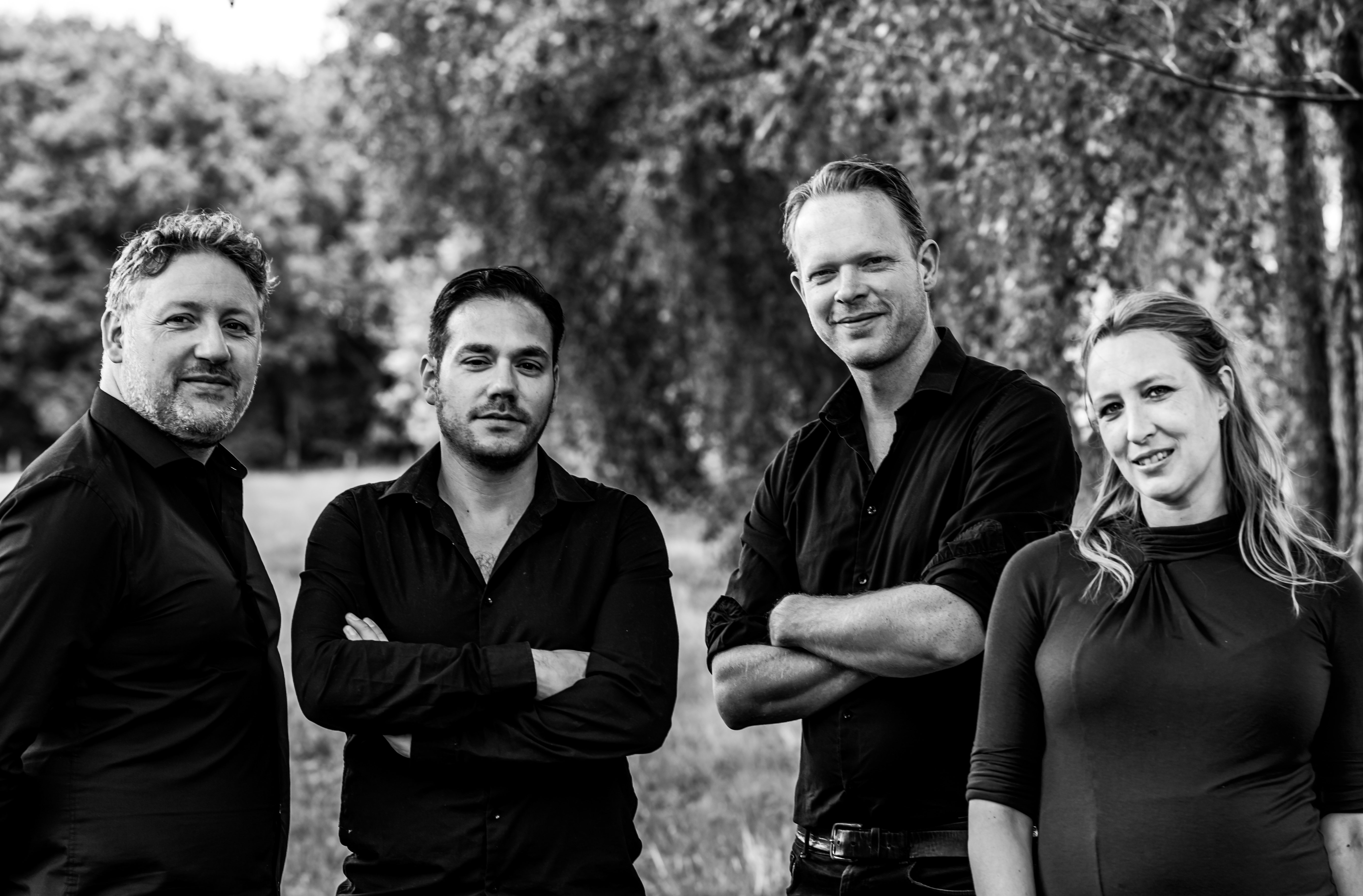 Matangi Quartet (2019)